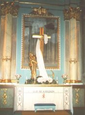 Altaruppsats i Lits kyrka